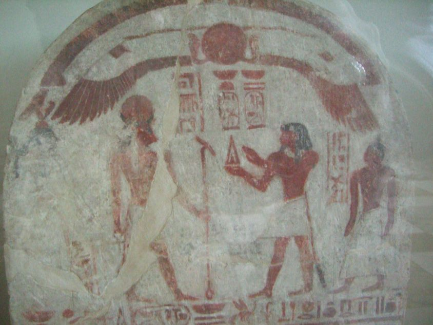 Stèle de l'Apis enterré en l'an 2 du règne de Pimay, XXIIe dynastie égyptienne.